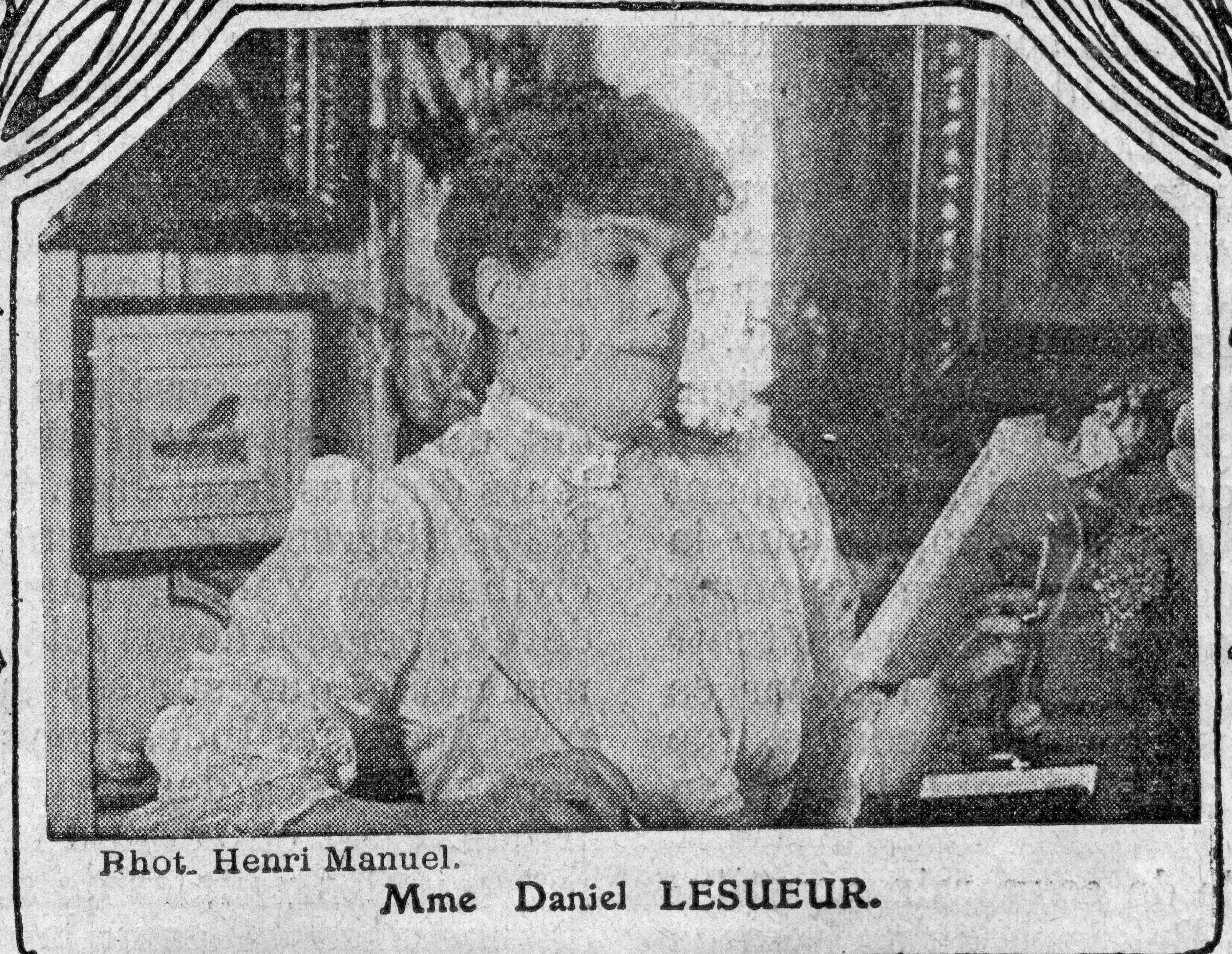 Touche à tout 1910 1er semestre p 29 Daniel Lesueur par Henri Manuel